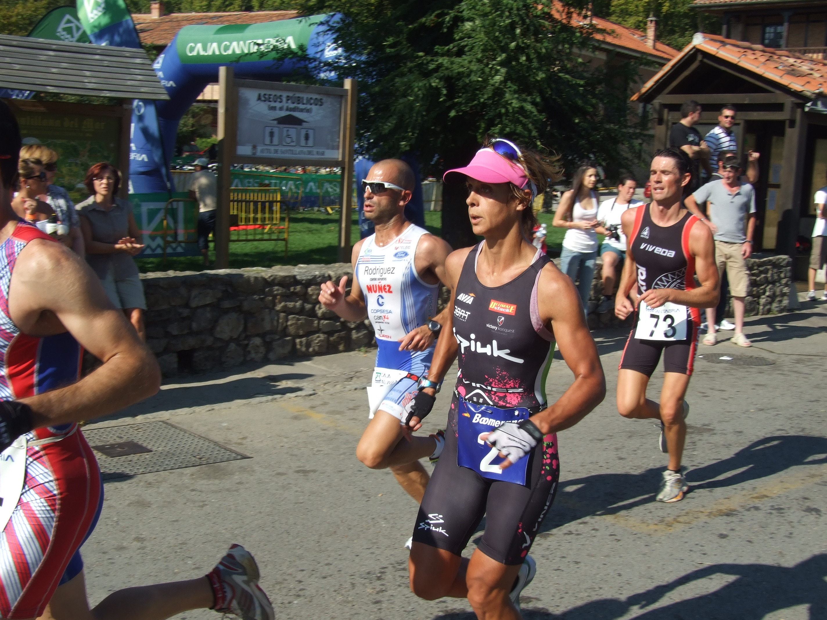 Inmaculada Pereiro en el Duatlón de Santillana del Mar en 2011.